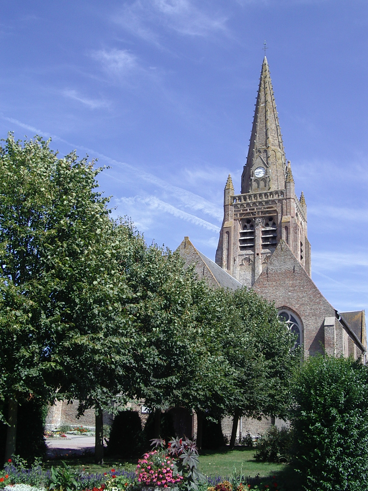 Eglise de Warhem (France, Nord)